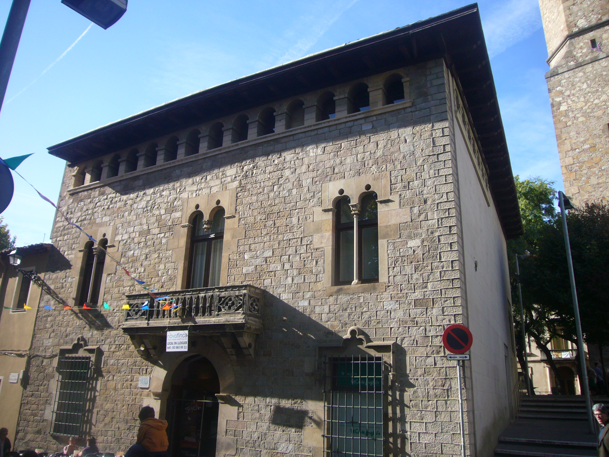 Can Margenat a la plaça de Sarrià